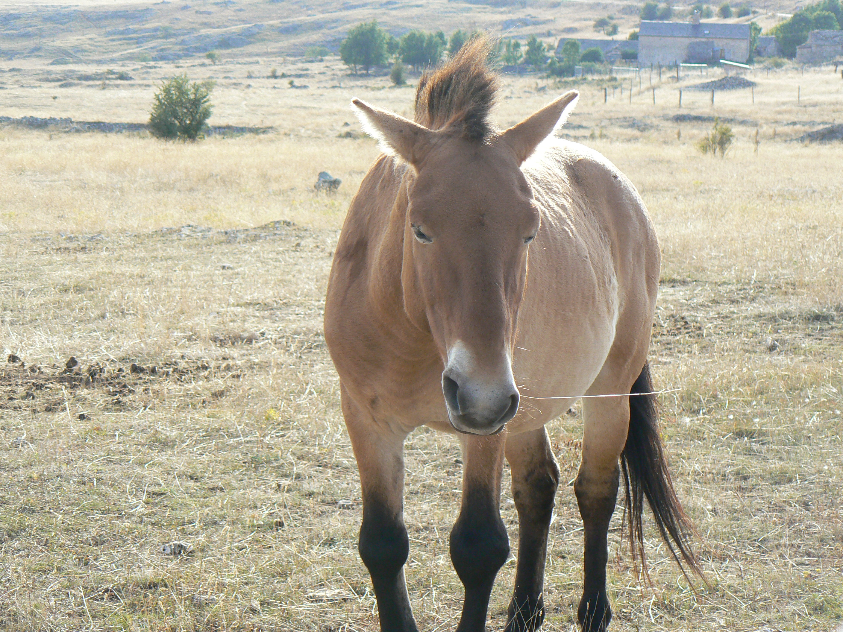 Chevaux de Przewalski sur le causse Méjean en Lozère